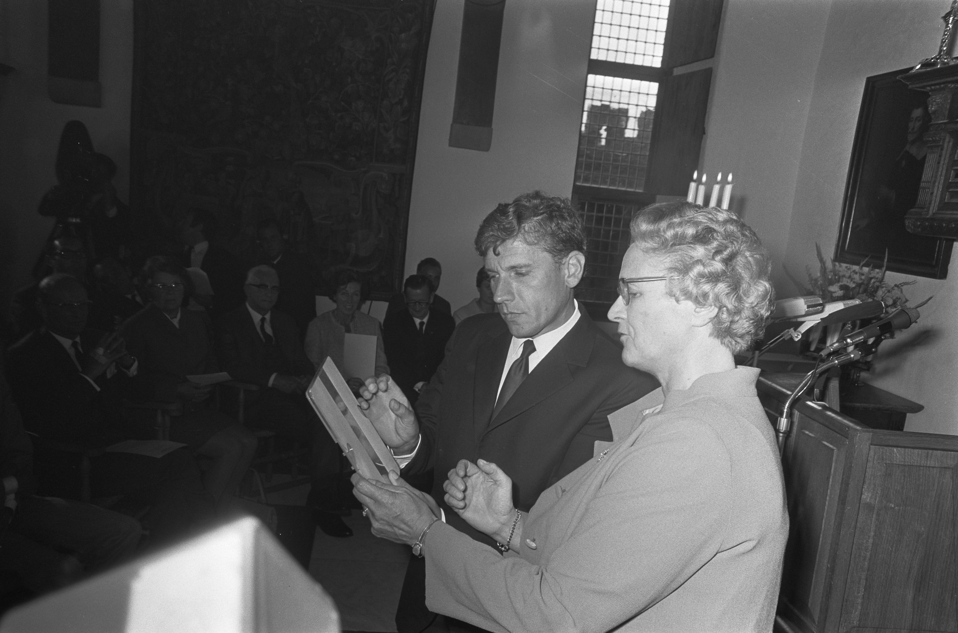 Minister M. A. M. (Marga) Klompé reikt staatsprijs voor Letterkunde, de P.C. Hooftprijs 1968, uit aan G. K. van het Reve op het Muiderslot, 26 augustus 1969